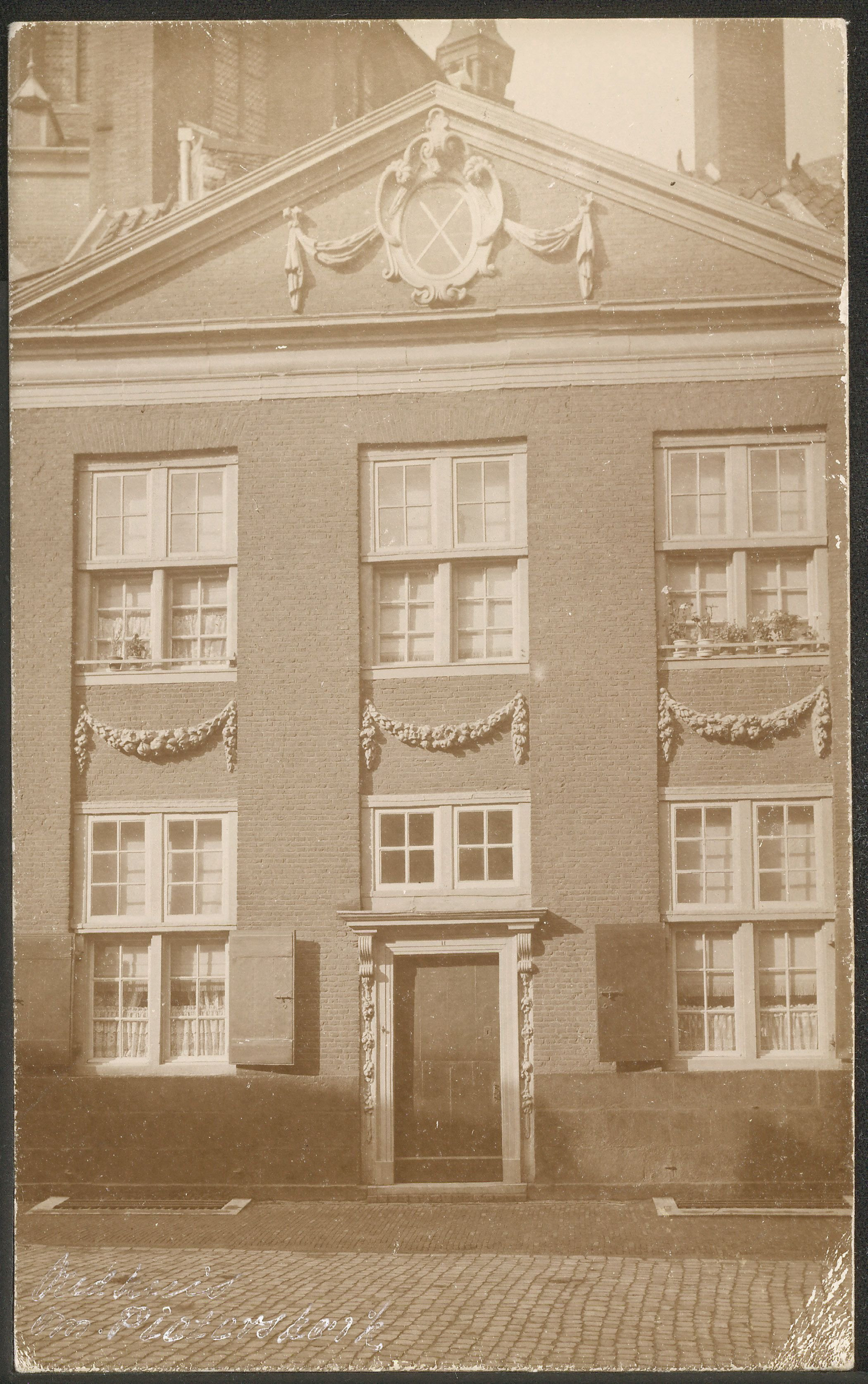 Voorgevel van het aan de koorzijde van de Pieterskerk gebouwde huis gelegen tegenover de Pieterskerkchoosteeg.